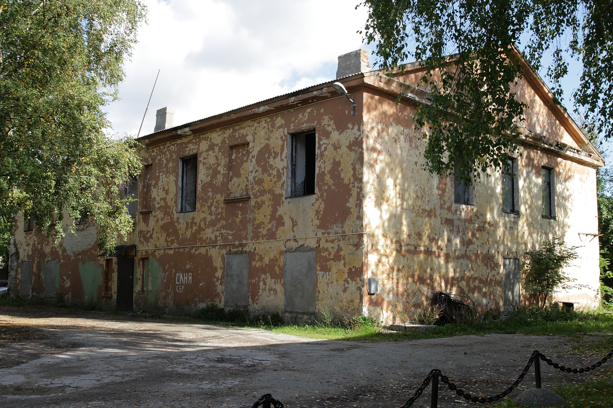 Tallinn, nn Uuslinna staabihoone, 18. saj. lõpp